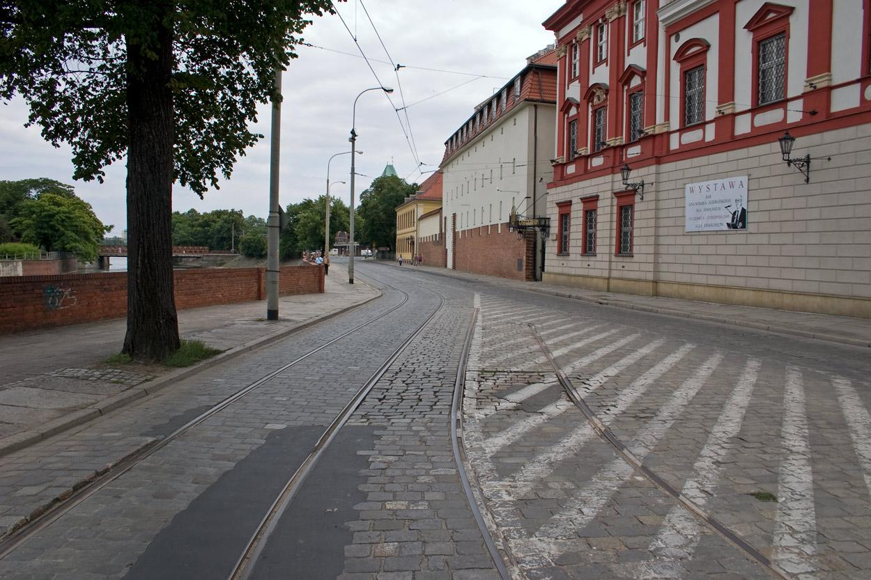 Ulica Grodzka widziana od strony skrzyżowania z Szewską w stronę Piaskowej. W bruku widać nieużywany tor będący dowodem na to, że tą ulicą tramwaje jeździły dawniej w dwie strony (choć na pewnych odcinkach po jednym torze). Bruku już nie ma, starego toru również...